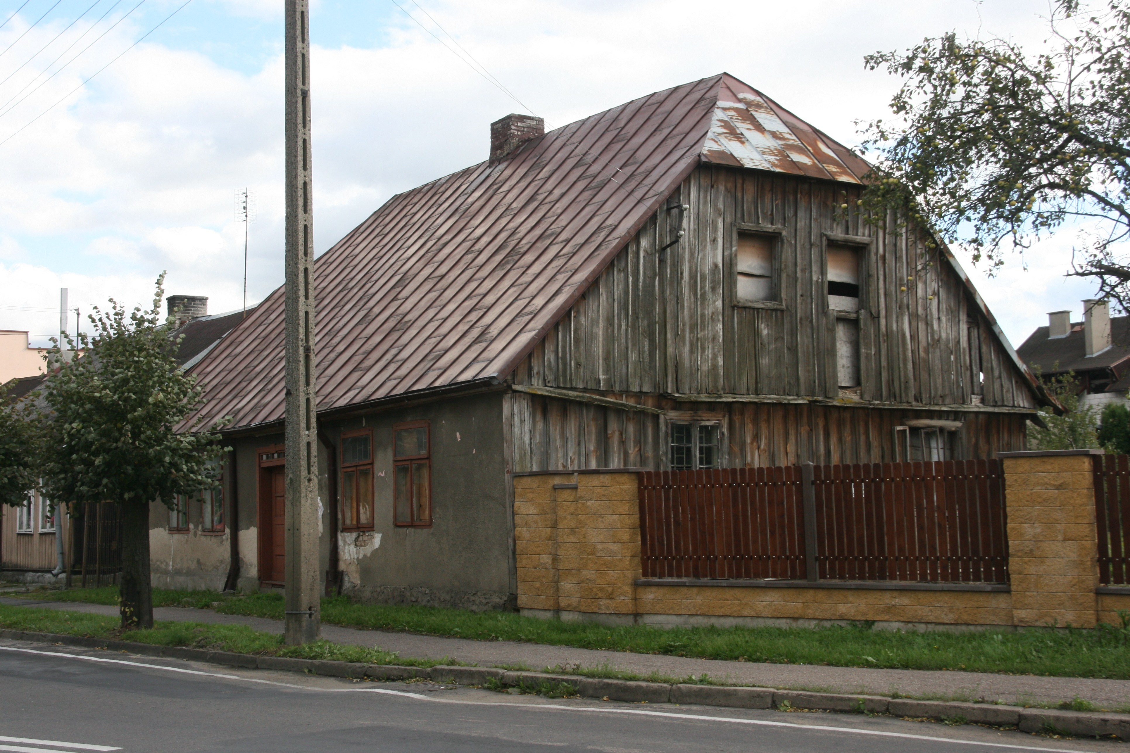 Dom drewniany, początek XIX w. Bieżuń ul. Sierpecka 19, Gmina Bieżuń